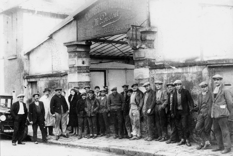 Personnel de la Carrosserie Pourtout à Bougival, Marcel Pourtout: quatrième en partant de la gauche